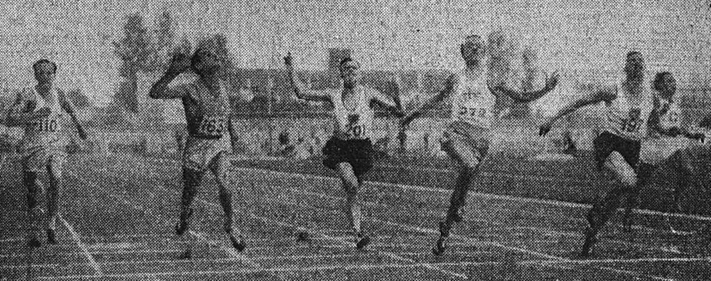 Finale du 100 mètres du championnat d'Europe à Colombes (G. à D. Sweeney, Mariani, van Beveren, Stranberg, Osendarp le vainqueur, et marchand).